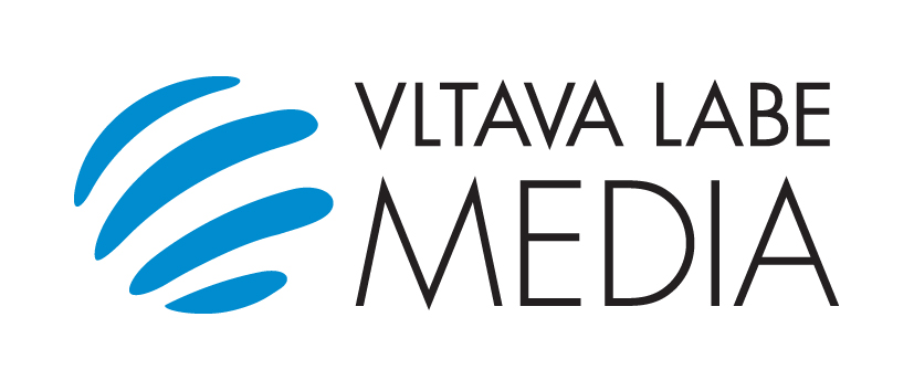 Oficiální logo vydavatelství VLTAVA LABE MEDIA.